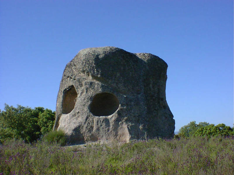 Canchal